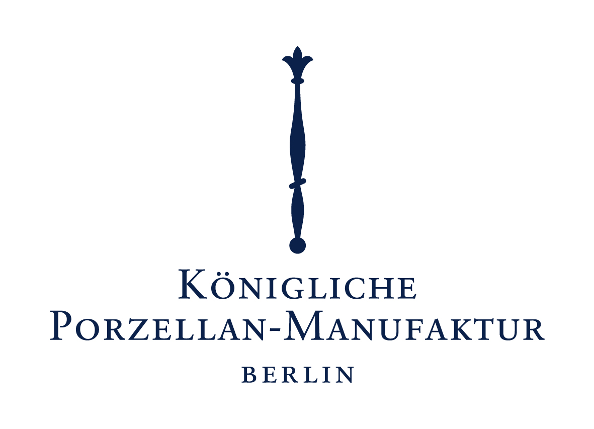 KPM Logo